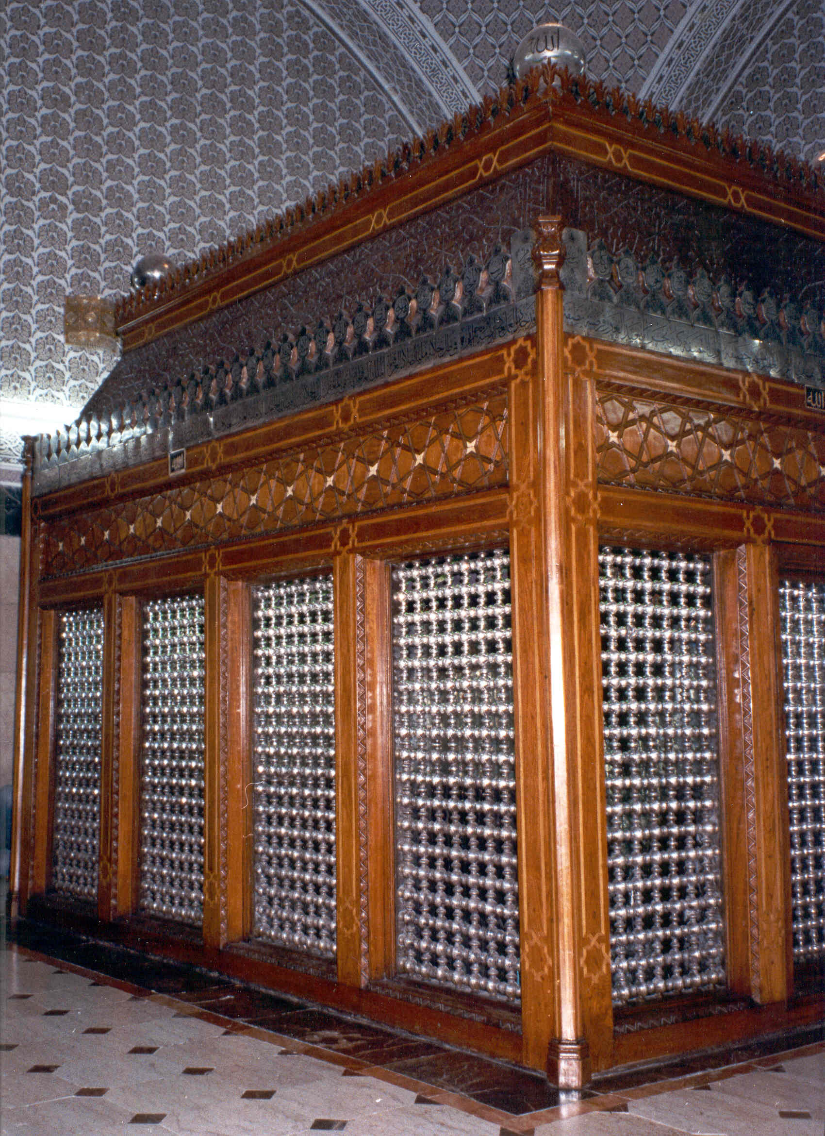 Grab von Abu hanifa